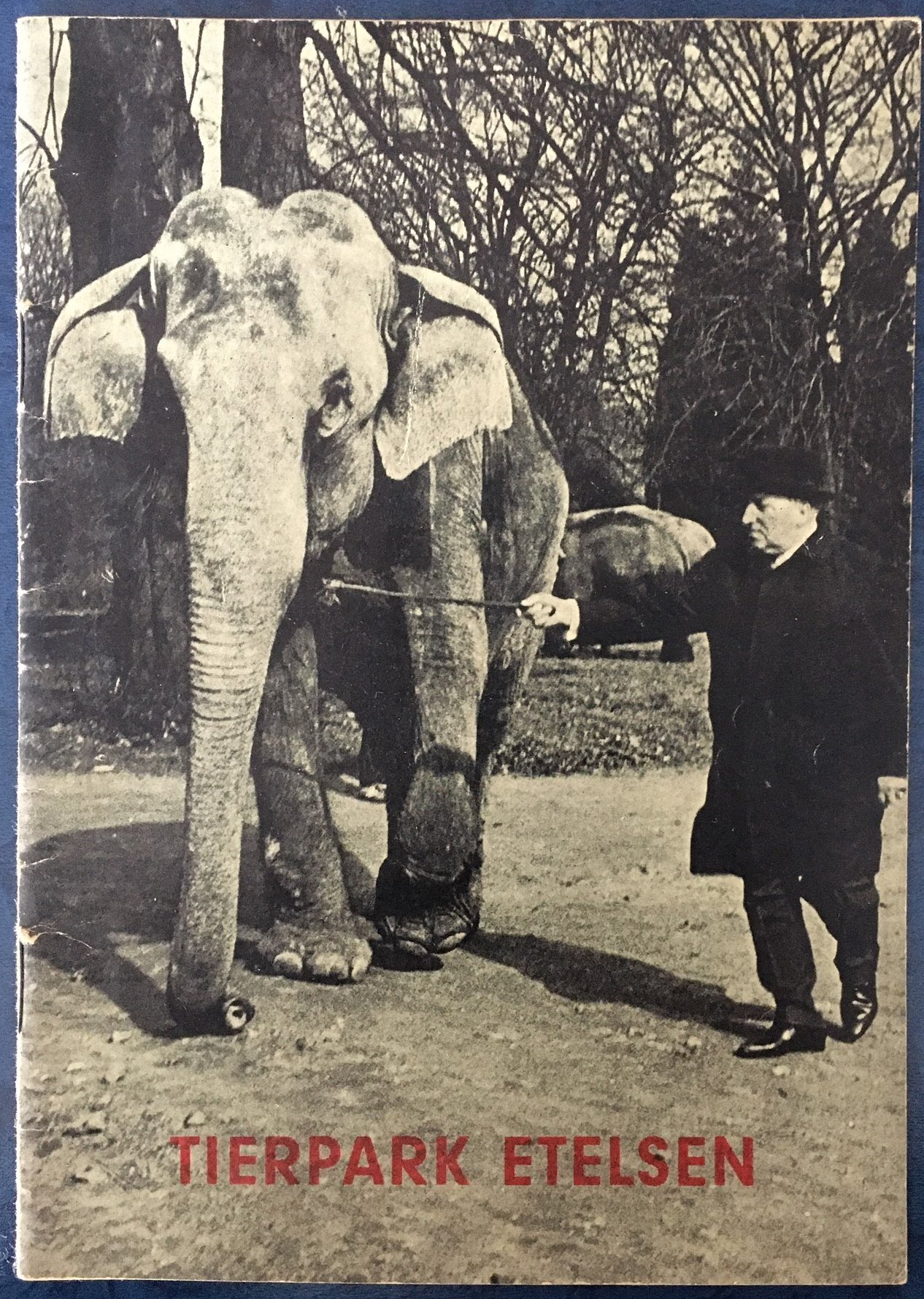 Es handelt sich um das Umschlagbild des Besucherprospektes des Tierparks Etelsen; Ausgabe 1965/66